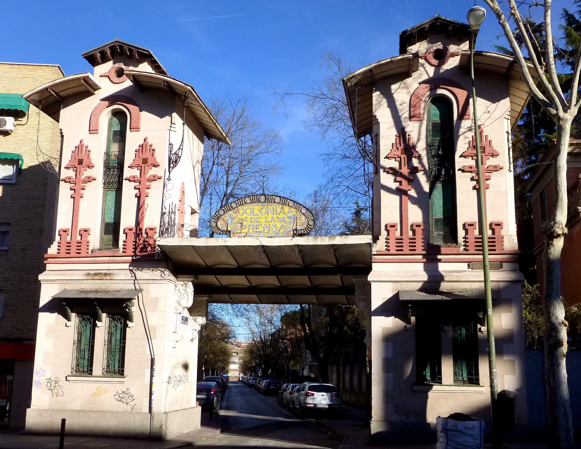 Colonia de la Prensa (Carabanchel, Madrid)